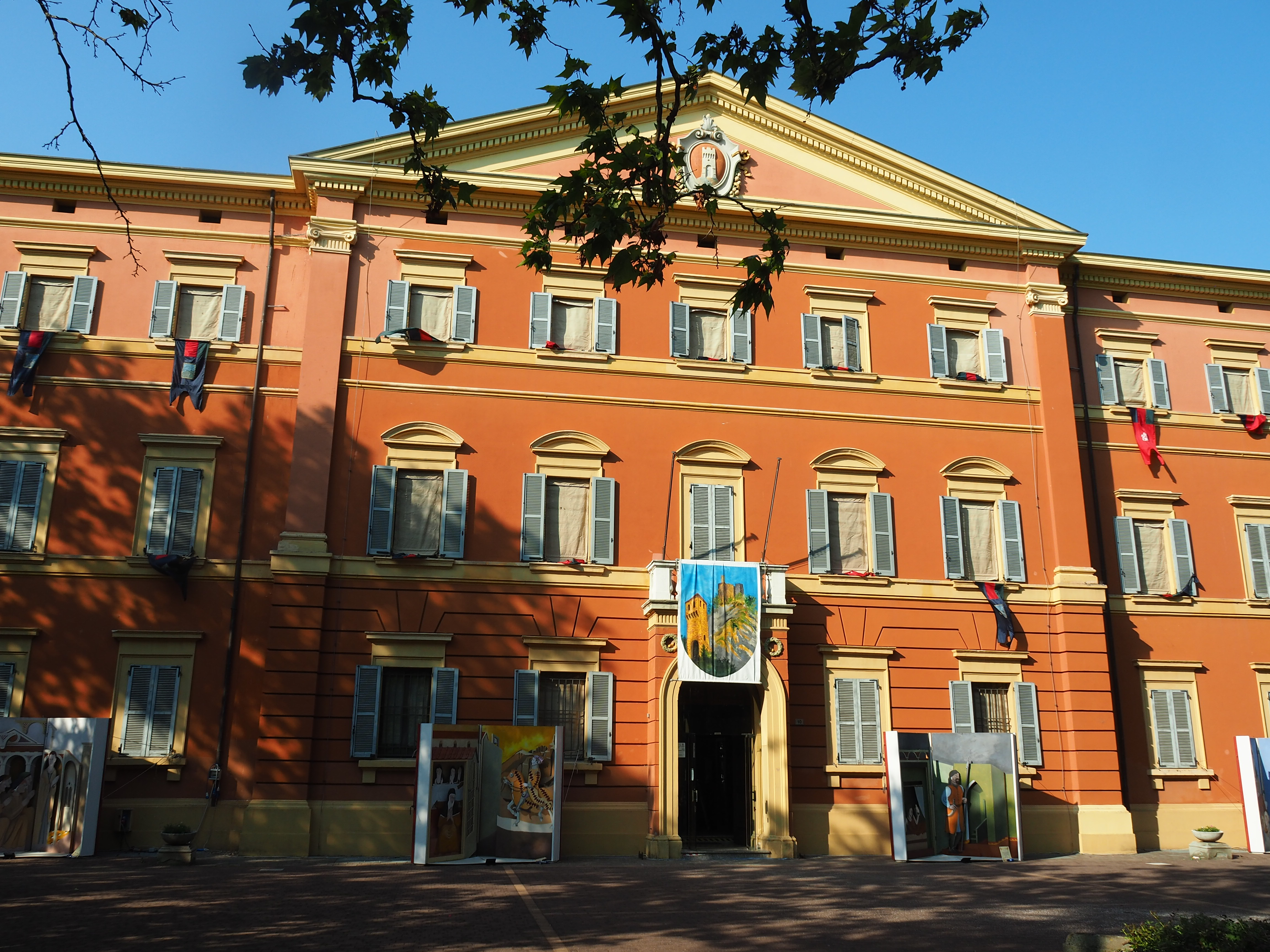 palazzo municipale - Monumento ai Caduti This is a photo of a monument which is part of cultural heritage of Italy.